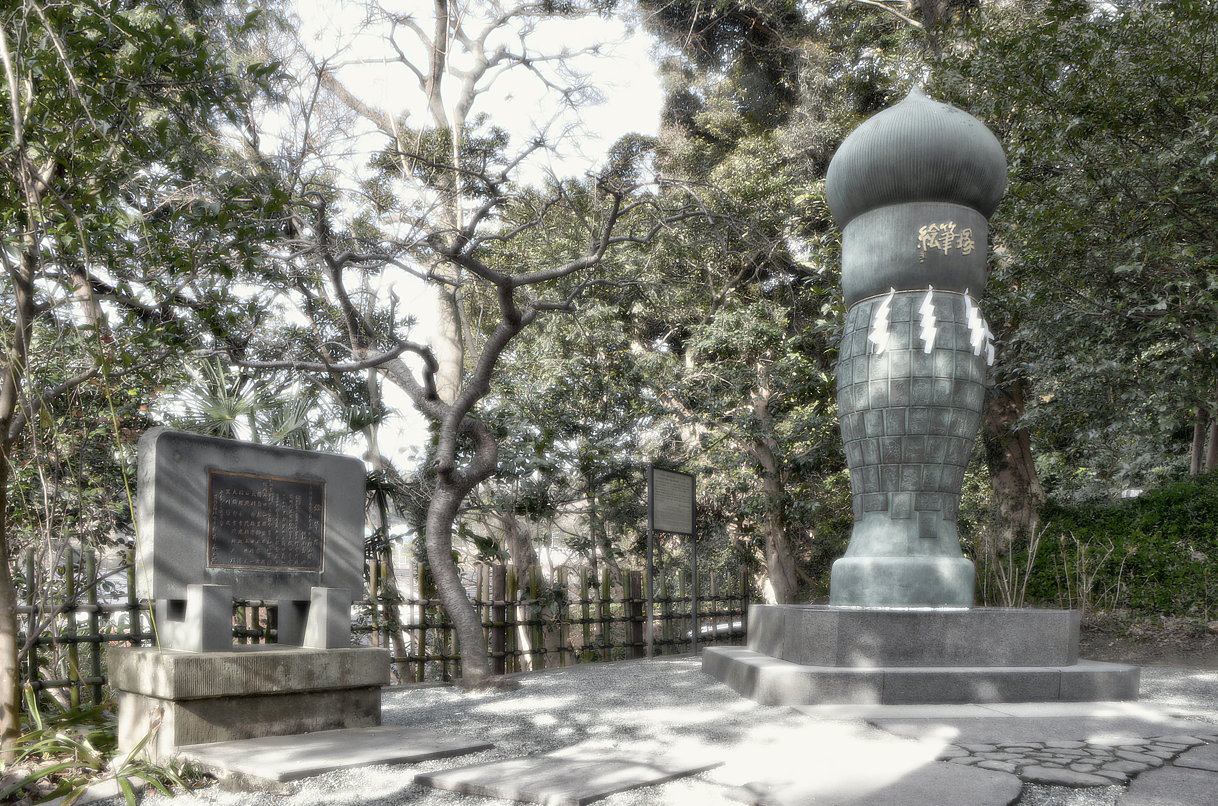 鎌倉 荏柄天神社の境内にある絵筆塚